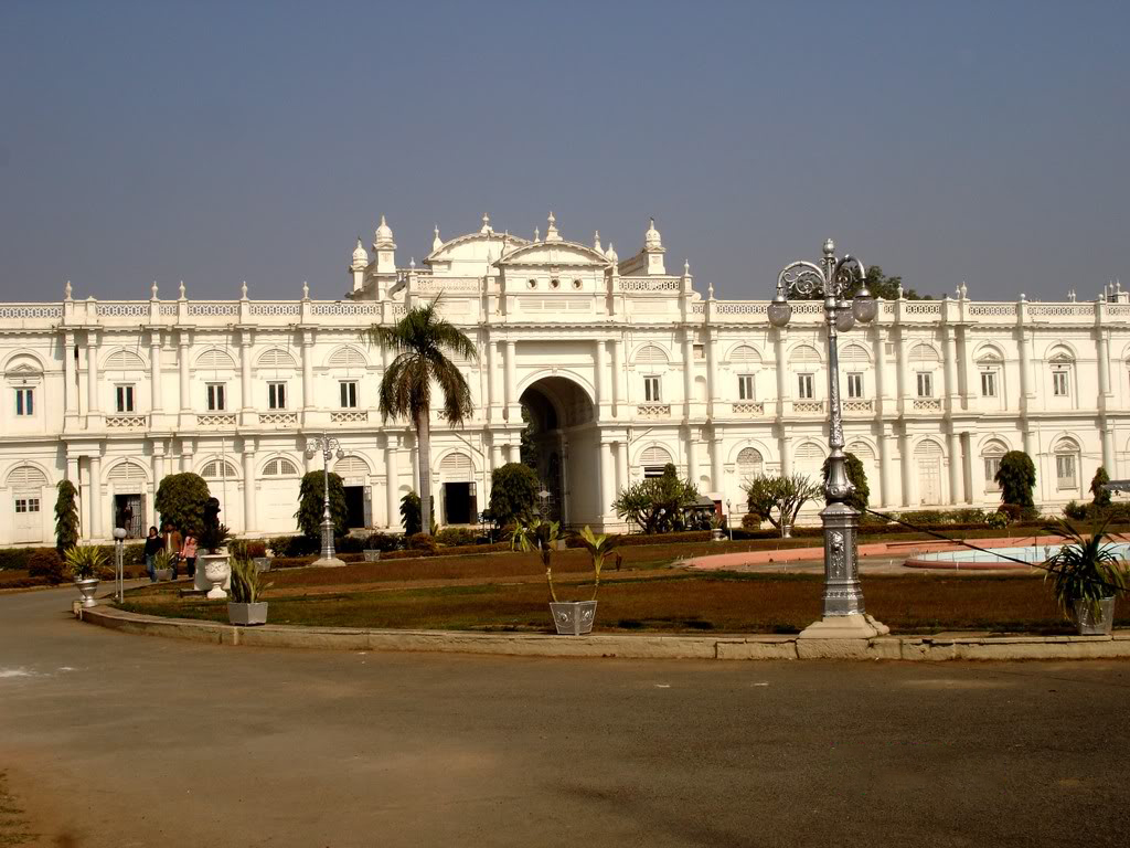 jaivilas palace gwalior